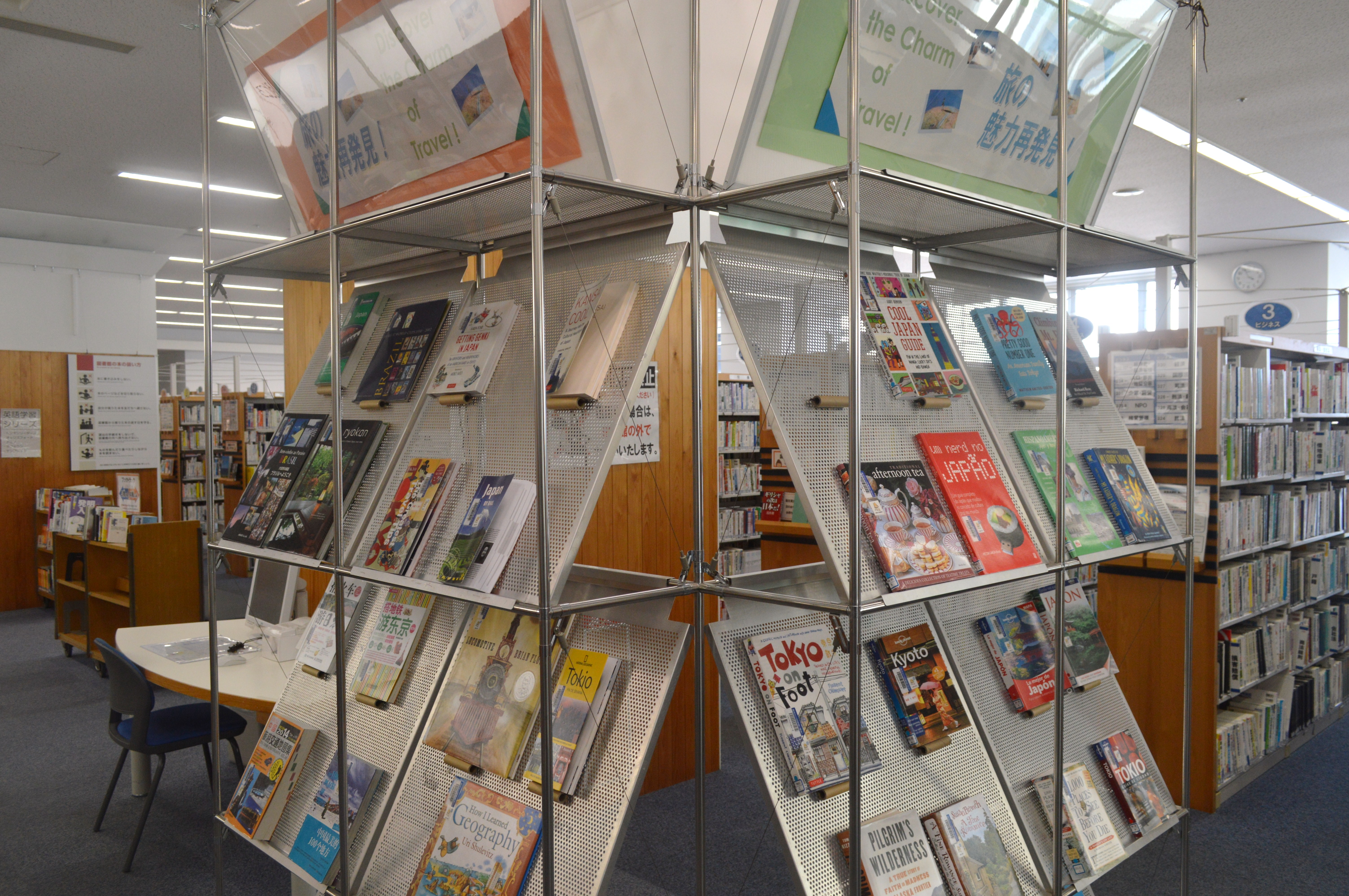 静岡市立御幸町図書館。静岡市立図書館のひとつ。